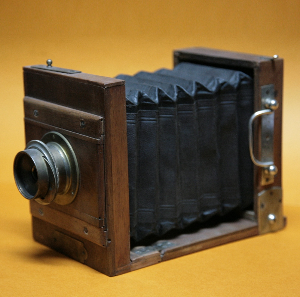 John Stock Wet Plate Camera 1866, macchina prodotta negli USA